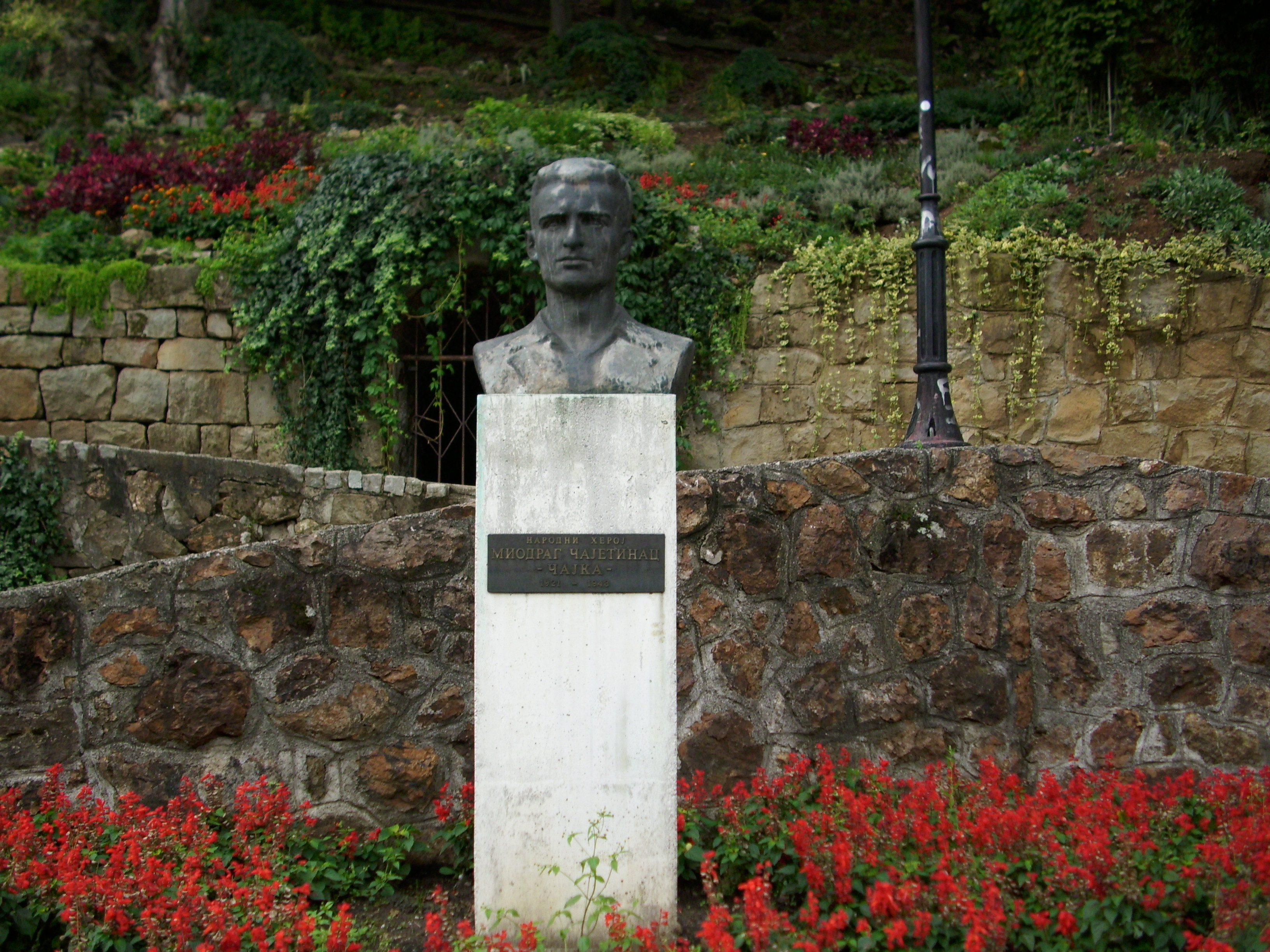 Споменик Чајки у Врњачкој Бањи